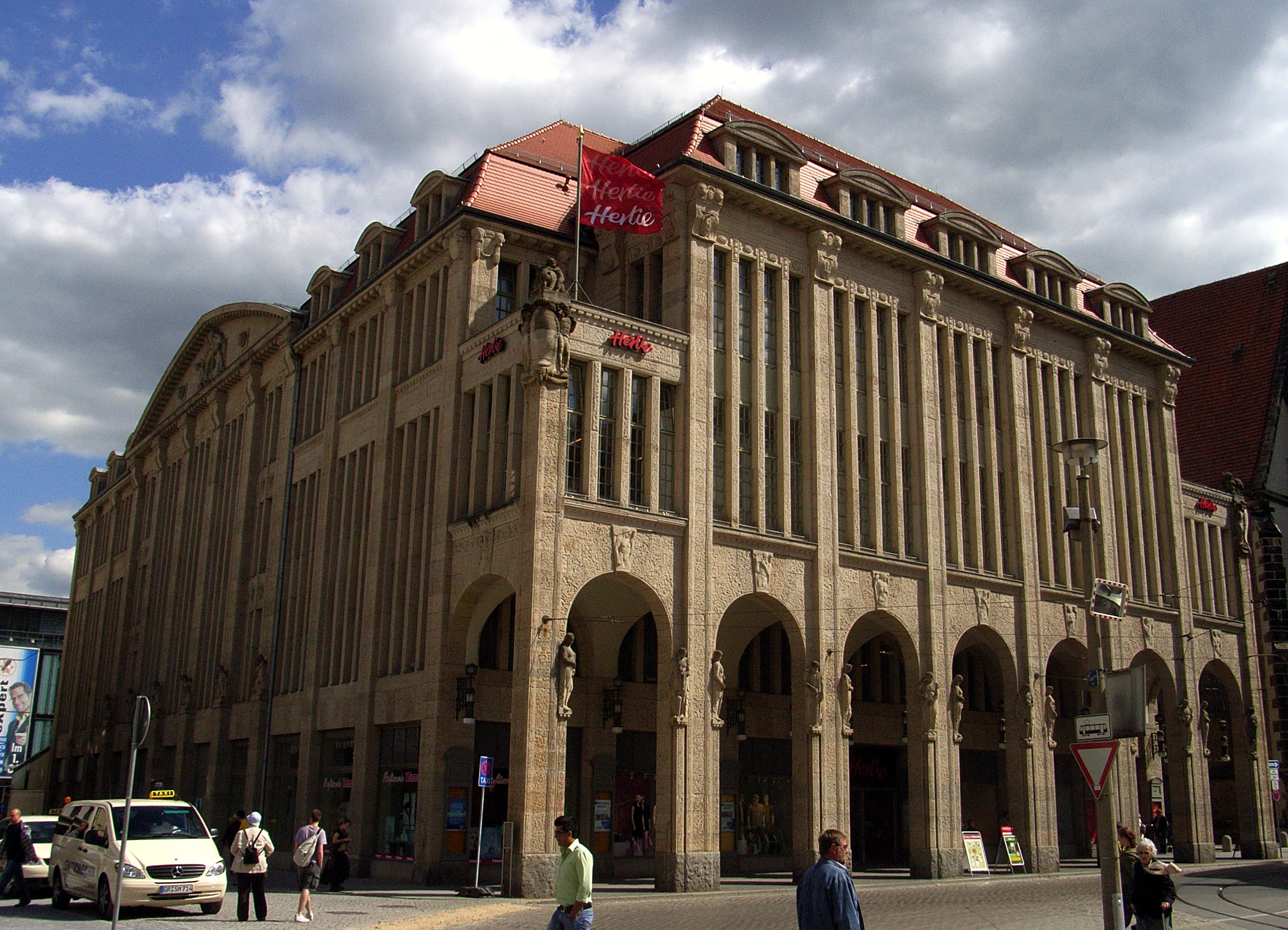 ehemaliges Kaufhaus zum Strauß in Görlitz